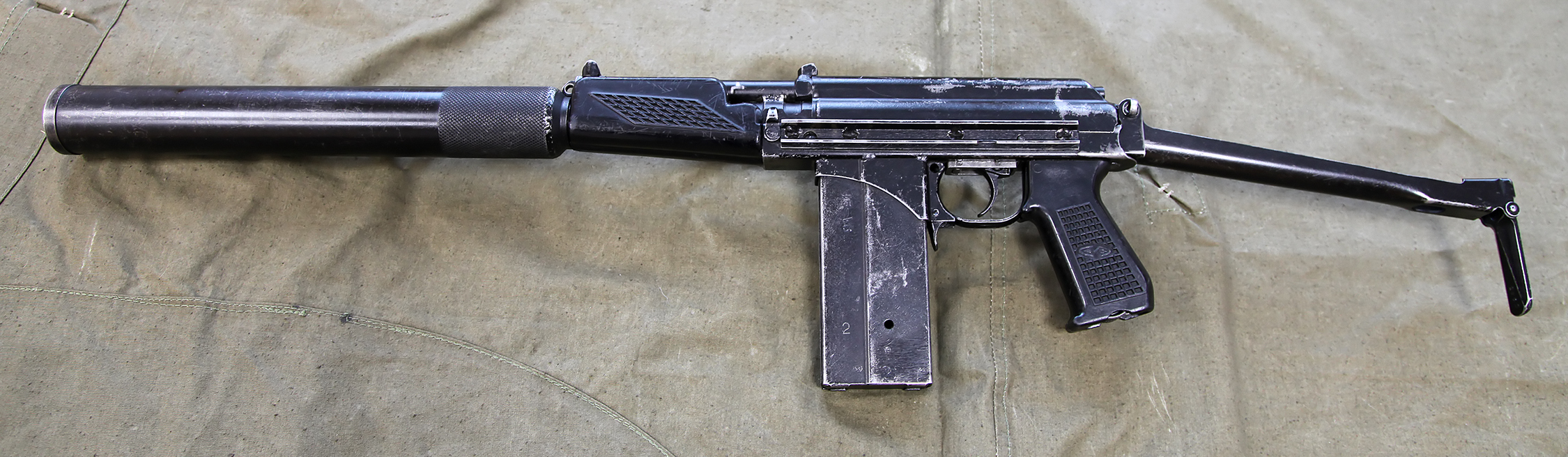 9A-91 compact assault rifle